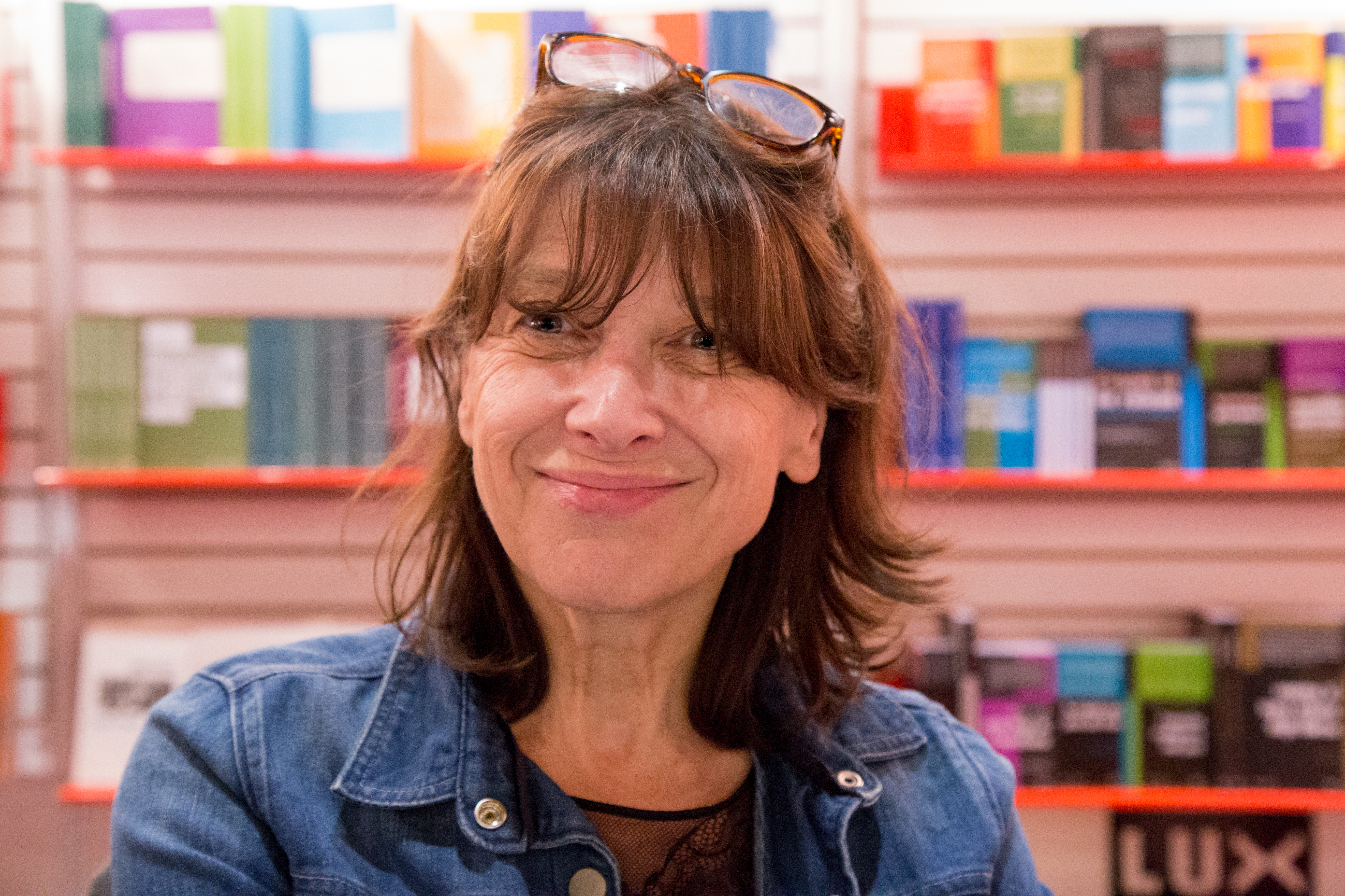 L'auteure et éditrice Marie-Christine Lévesque lors du Salon du livre de Montréal 2017 à la Place Bonaventure.